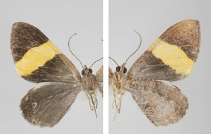 Hagnagora luteoradiata